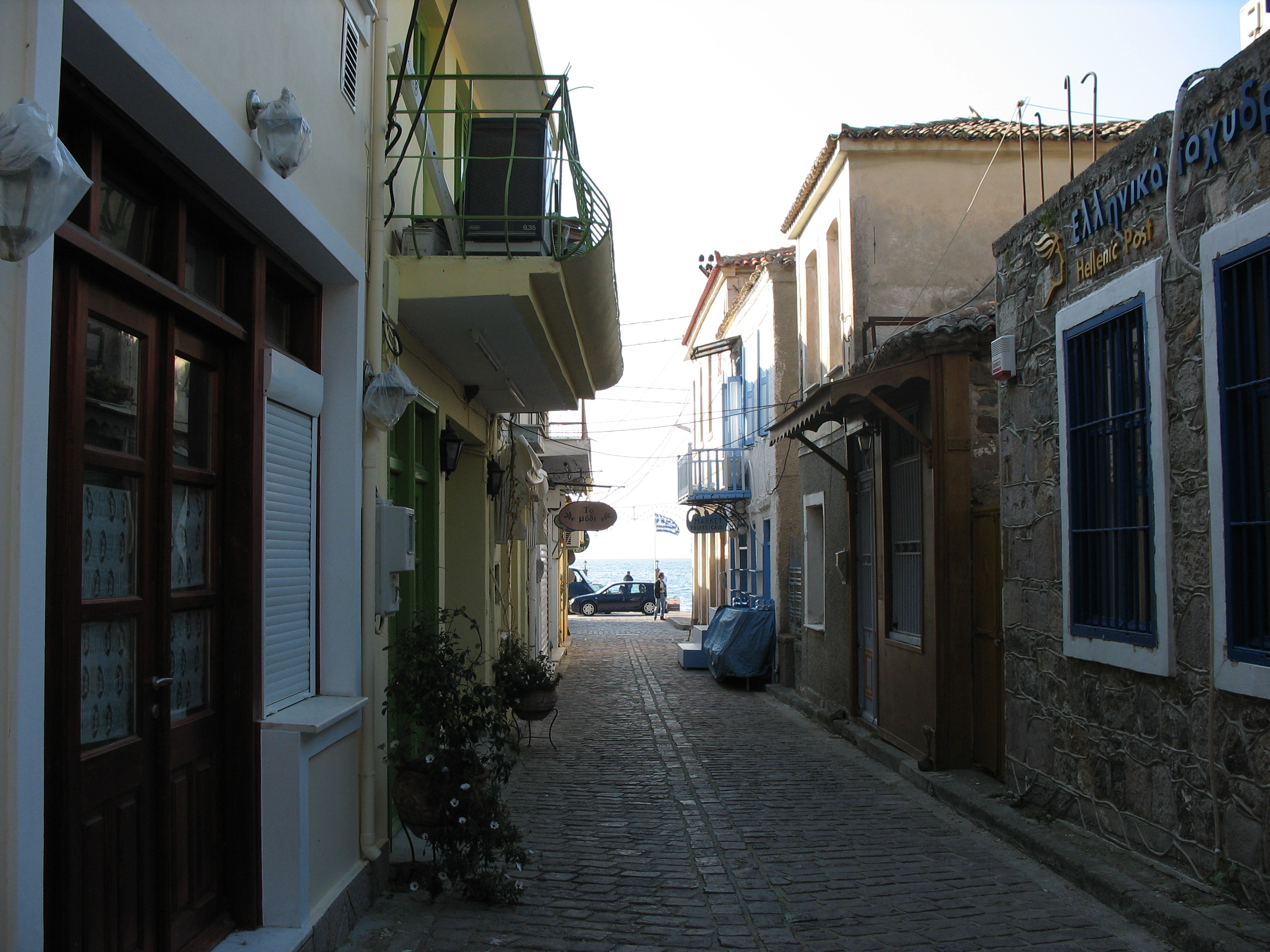 Petra